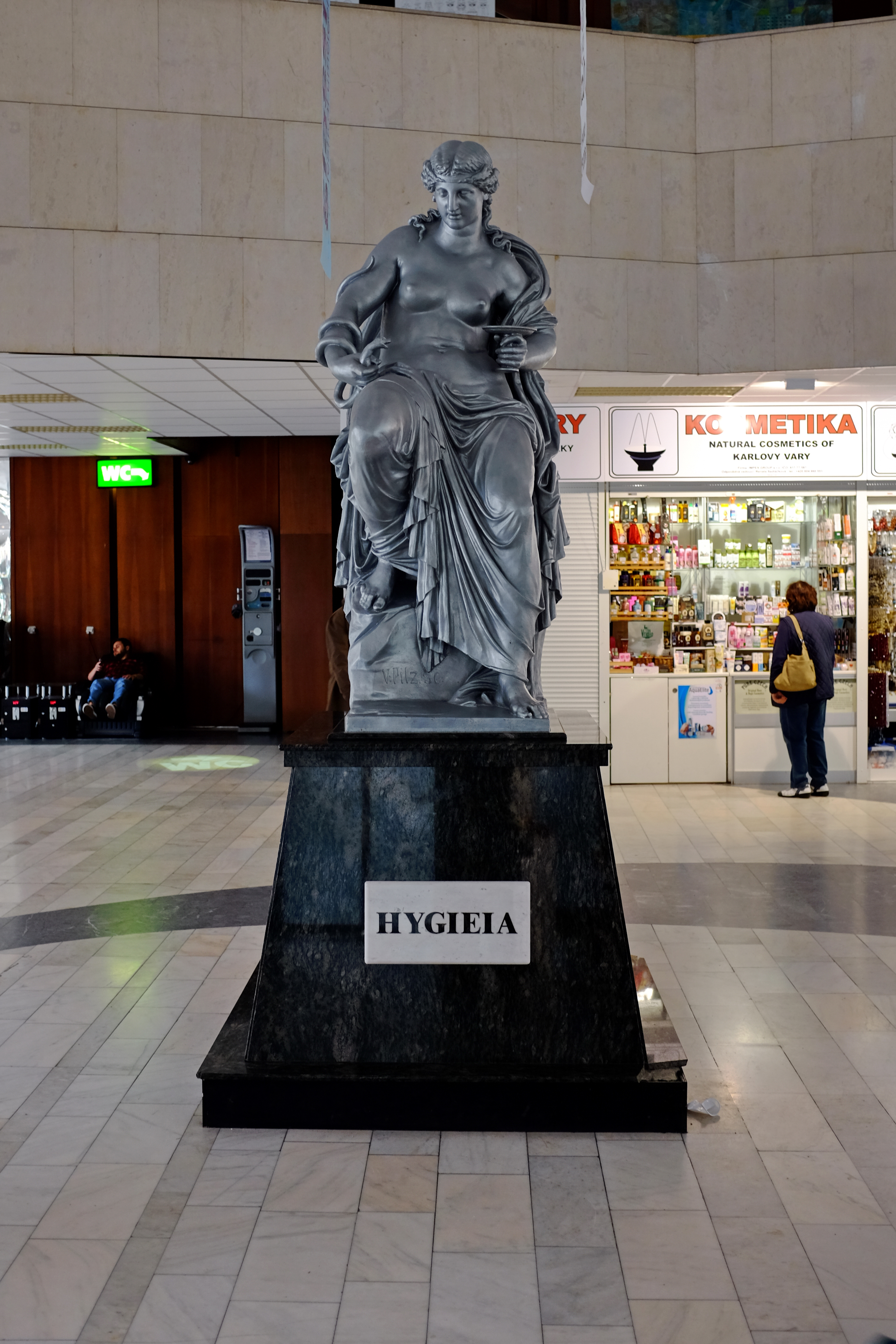 Socha Hygie, přemístěna do muzea Nová Louka, Karlovy Vary.